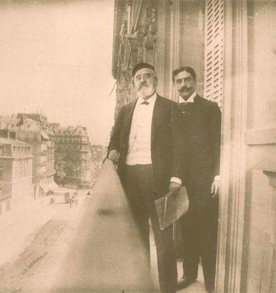 Docteur Adrien Proust et son fils Robert au balcon du 45 rue de Courcelles entre 1900 et 1903. Photographe inconnu. Exposition Proust, l'écriture et les arts, musée d'Orsay, Paris 1999. Paris - Paris, BnF, départements Littérature et Art, D242-769.